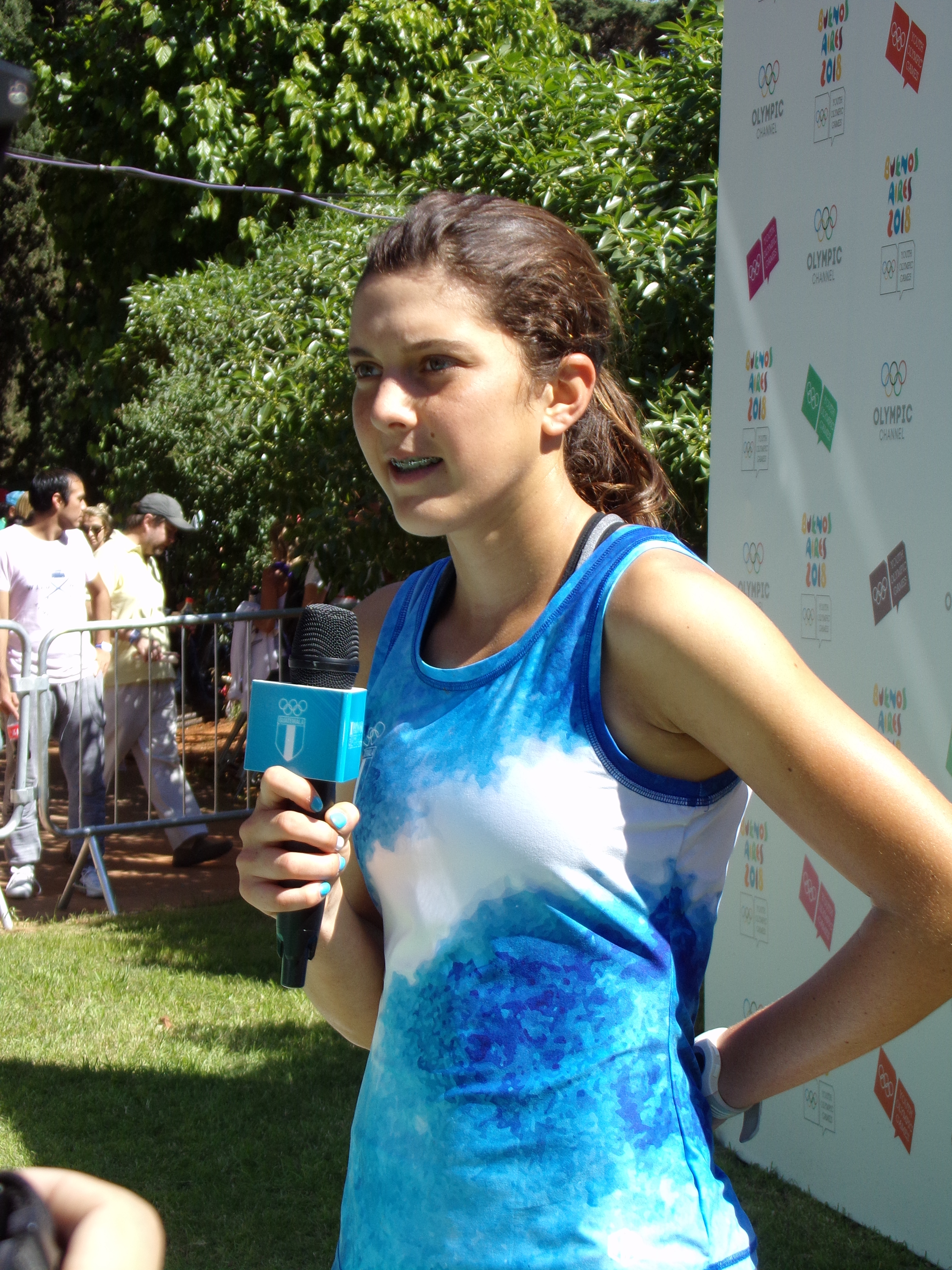 Maria Gabriela Rivera Corado en Buenos Aires 2018